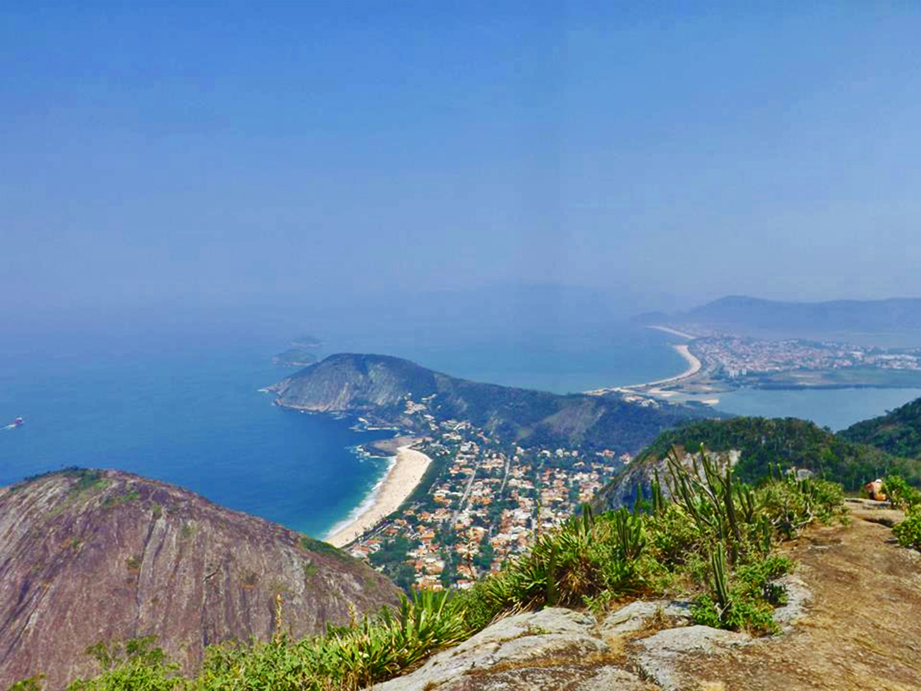 Com vista para as Praias Oceânicas e para o Costão de Itacoatiara.